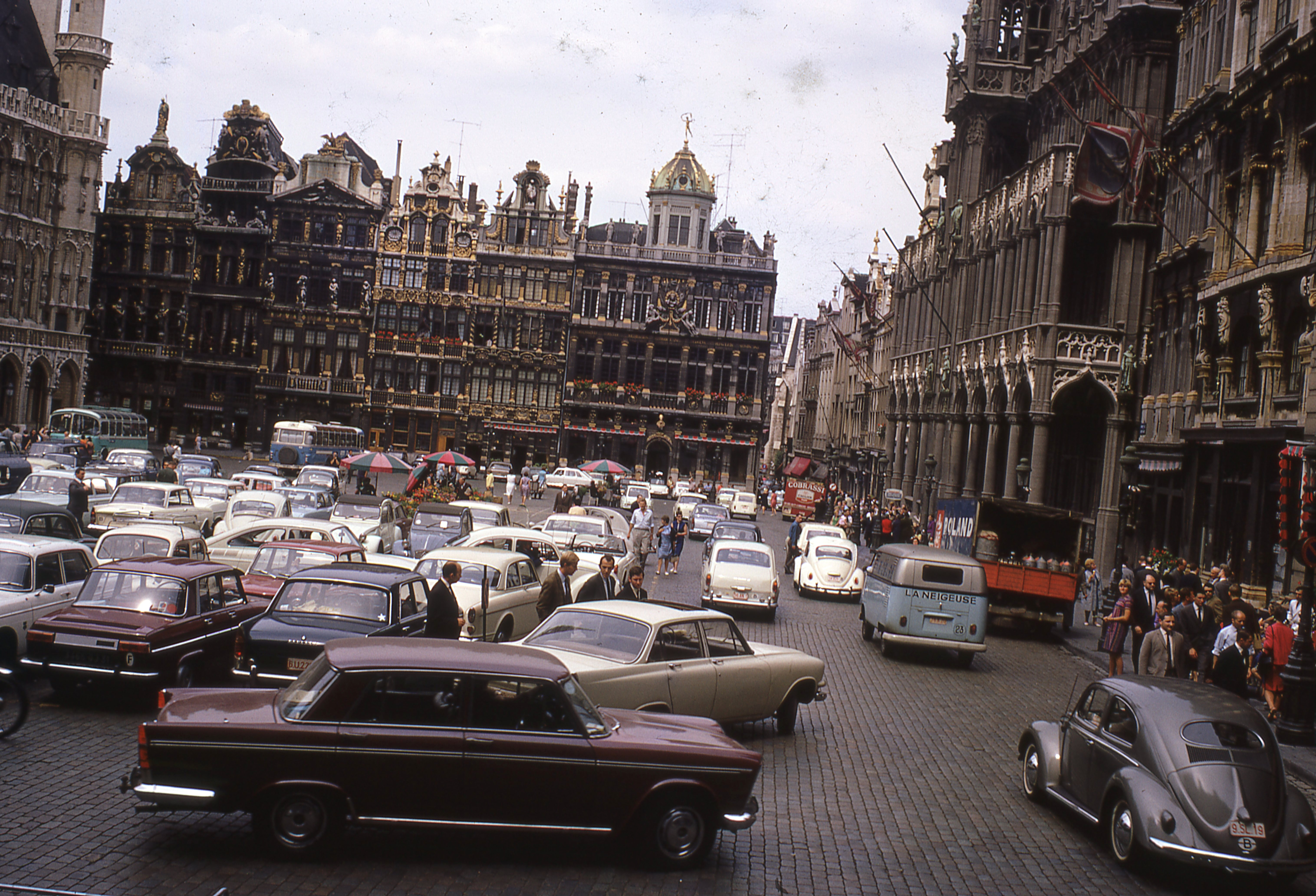 Grand-Place. Location: Belgium, Bruxelles Tags: car park, automobile, colorful, street view, traffic Title: Grand-Place.